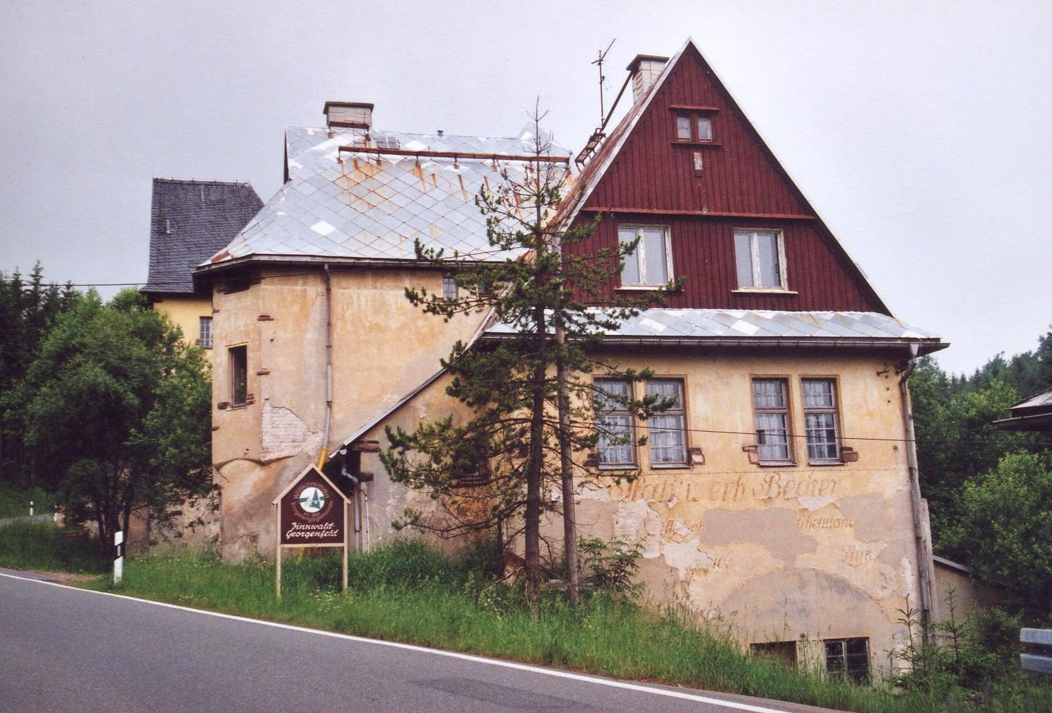 Zinnwald-Georgenfeld: Ehemaliges Verwaltungsgebäude (Geisingstraße 14) der Zinnaufbereitung der Stahlwerke Becker AG